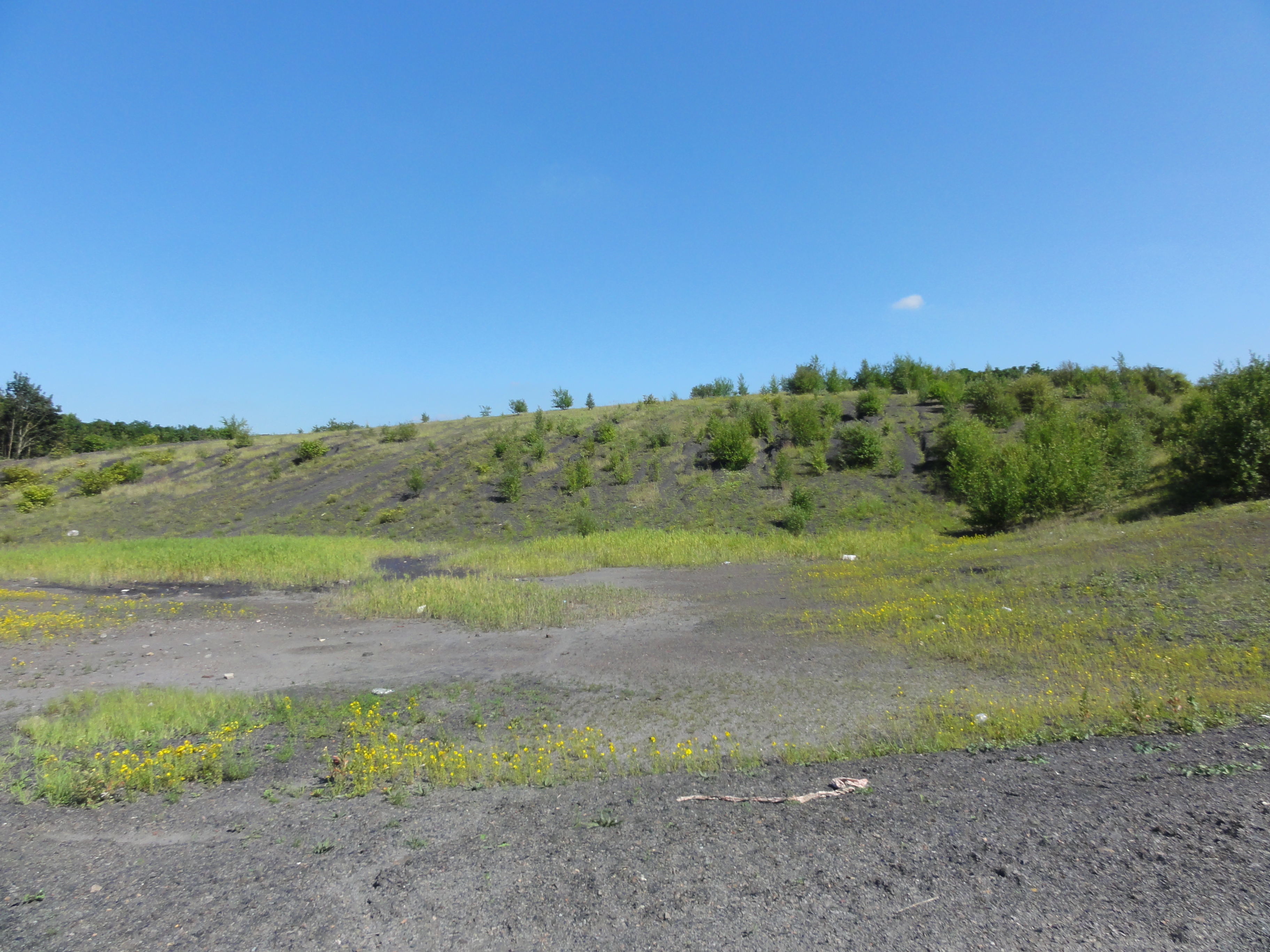 Terril n° 102 dit 4 Est de Dourges, fosse n° 4 - 4 bis de la Compagnie des mines de Dourges dans le bassin minier du Nord-Pas-de-Calais, Noyelles-Godault, Pas-de-Calais, Nord-Pas-de-Calais, France.